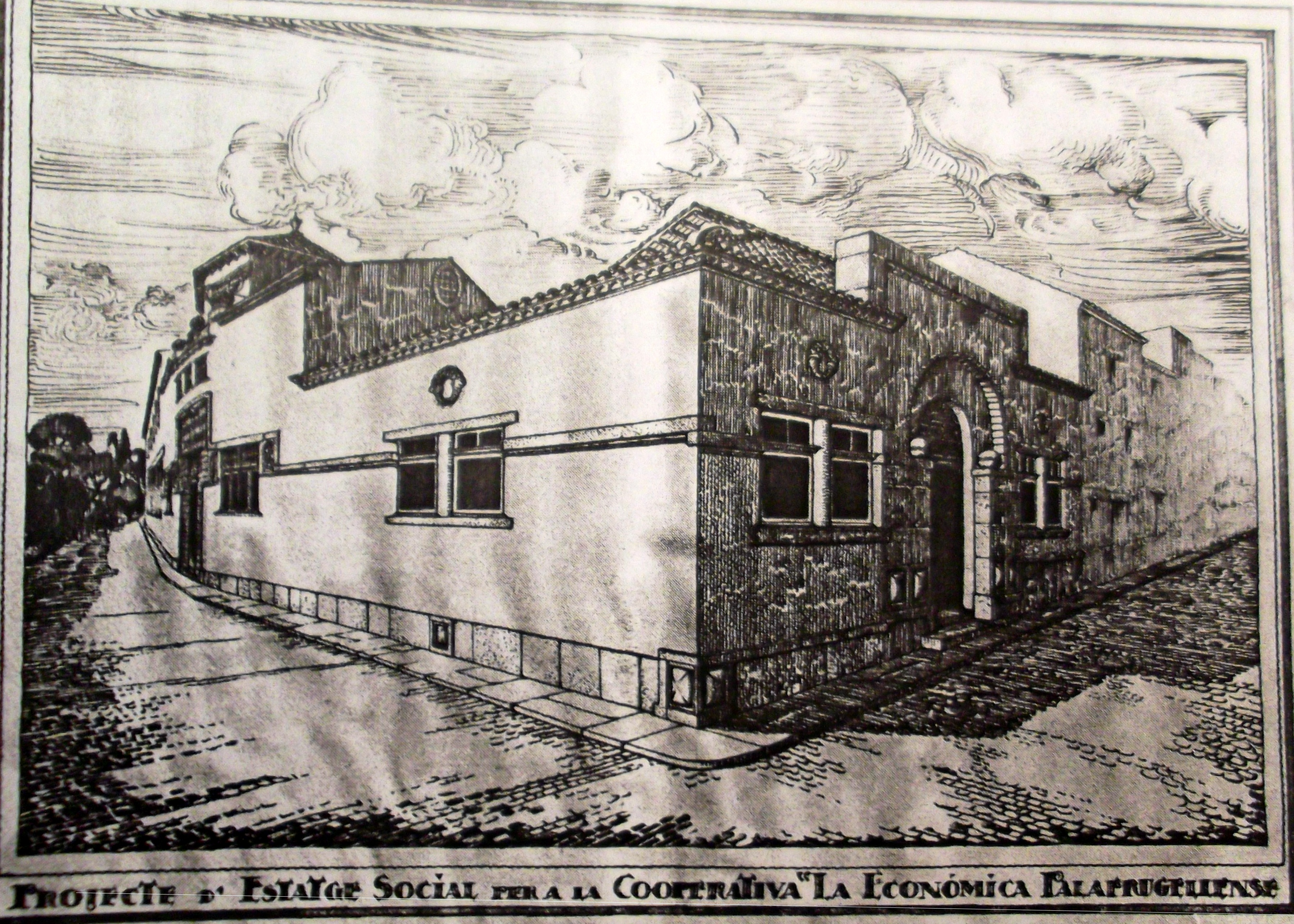 Plànol de la façana de l'edifici de l'Econòmica Palafrugellenca, dibuixat per Rafel Masó. Actualment s'hi estableix la Biblioteca de Palafrugell.